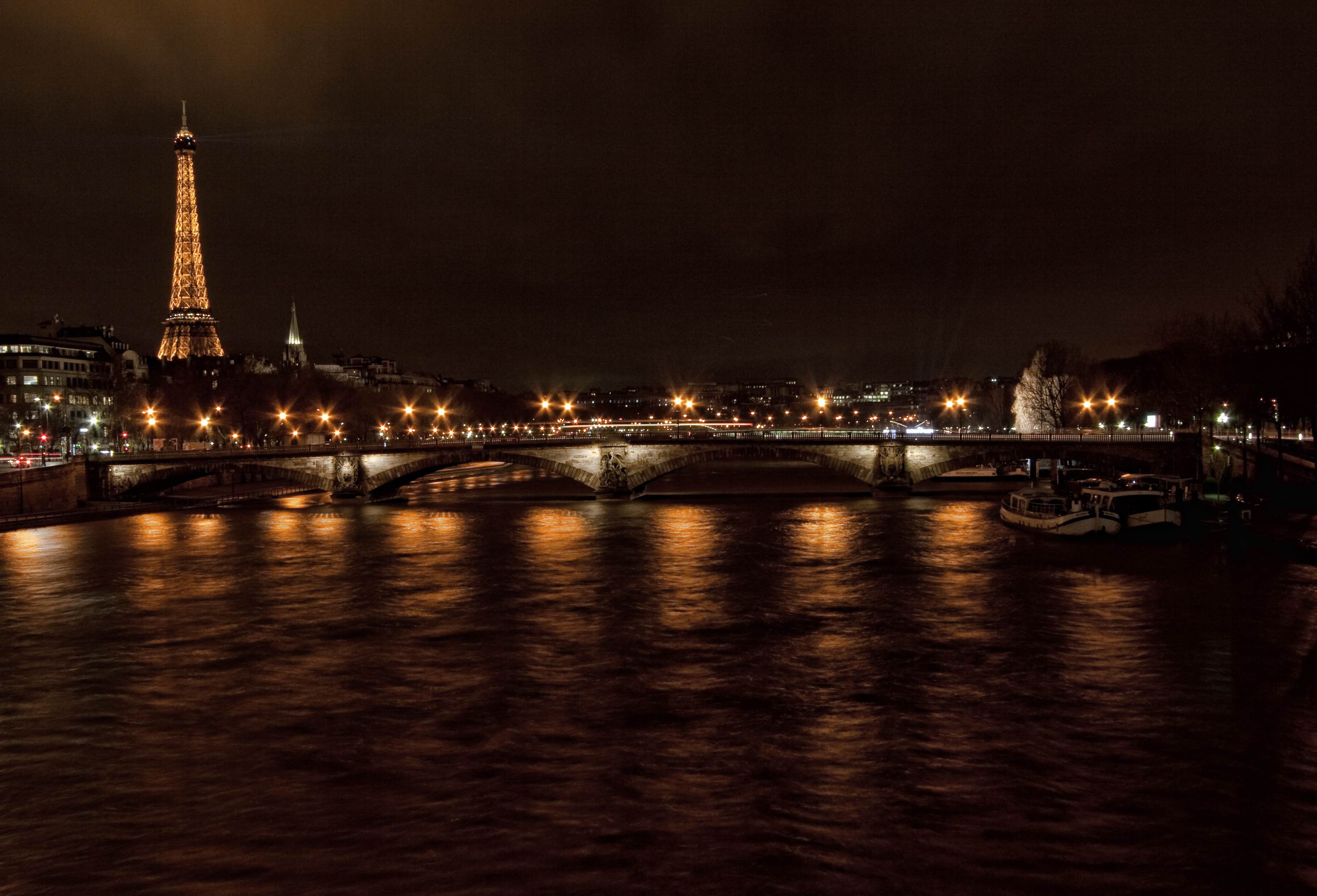 Vista del río sena, París